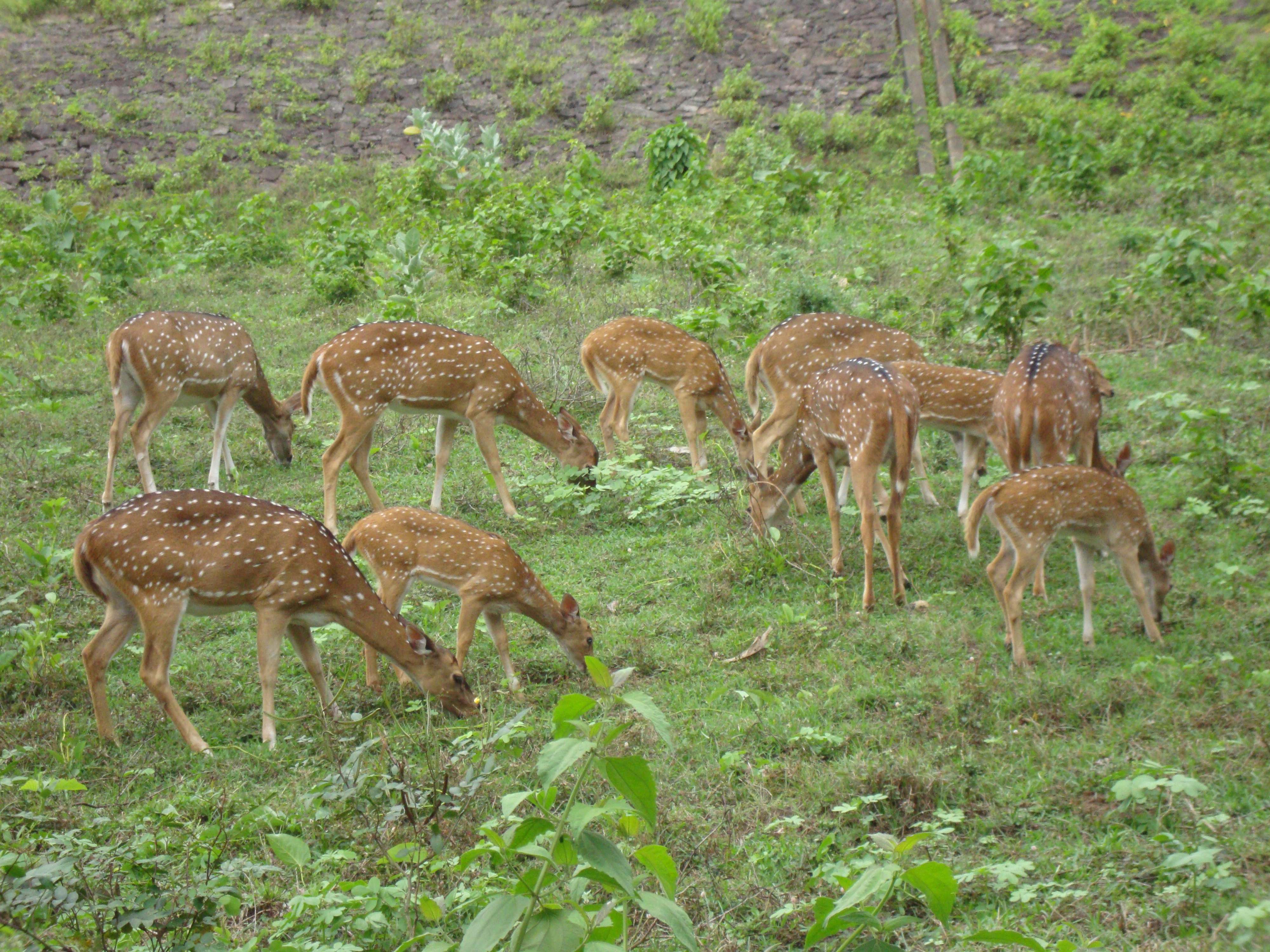 പുള്ളിമാൻ കൂട്ടം